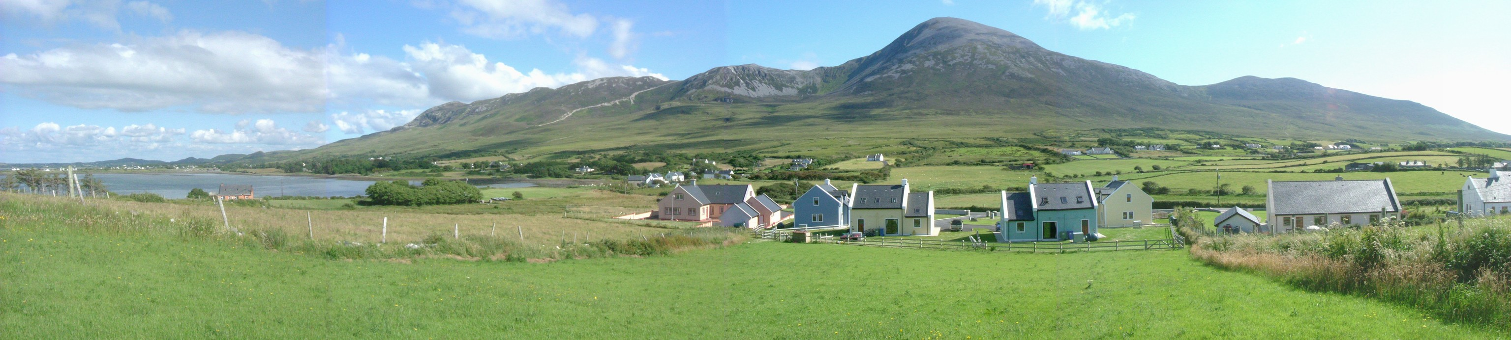 La monto Croagh Patrick.